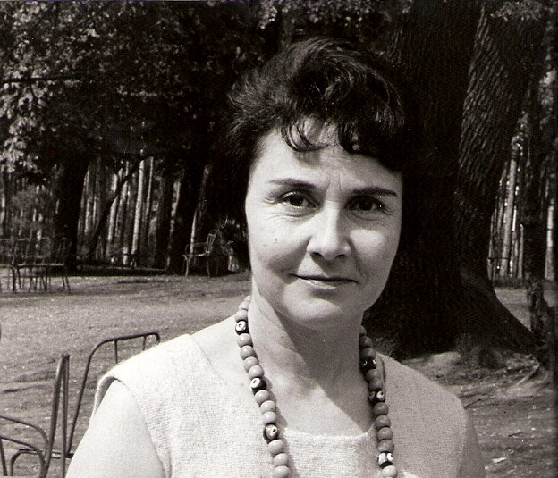 אנה לנגפוס